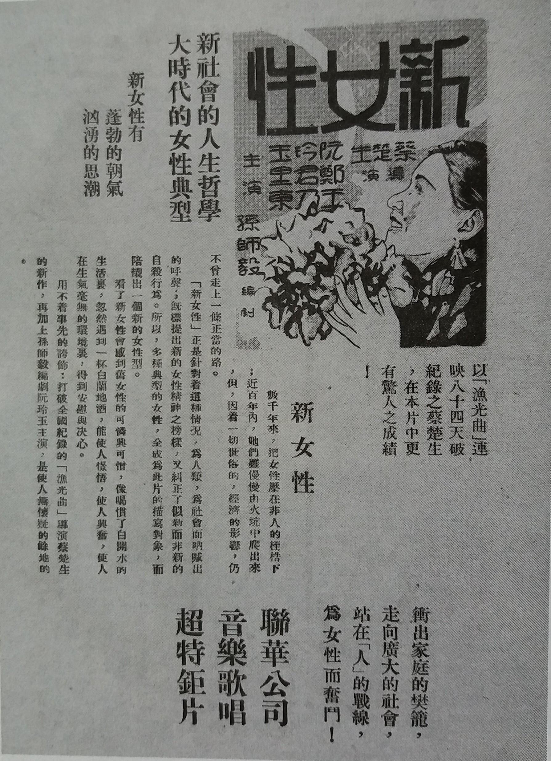 新女性海报